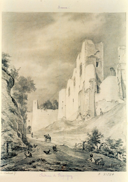 Château de Picquigny (Somme, Picardie) - 19e siècle.